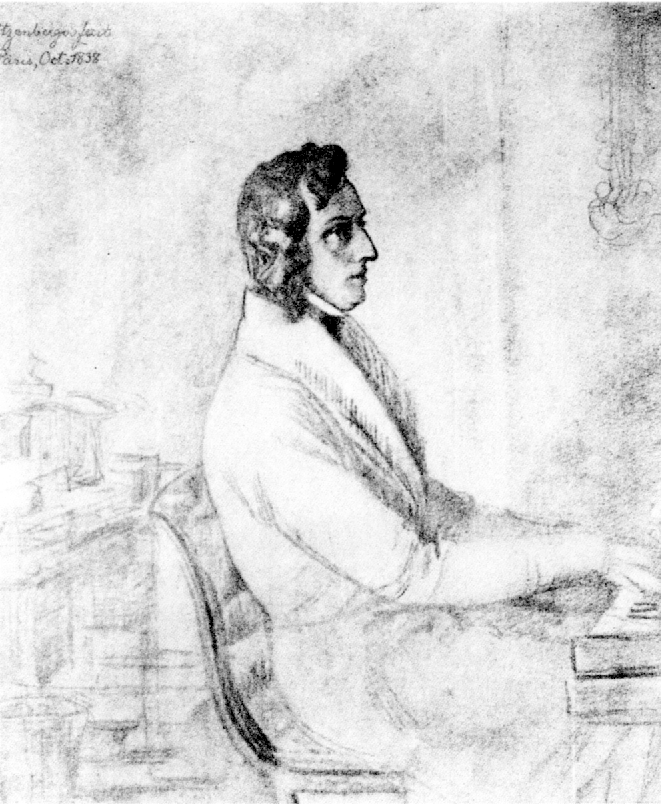 Frédéric Chopin 1883